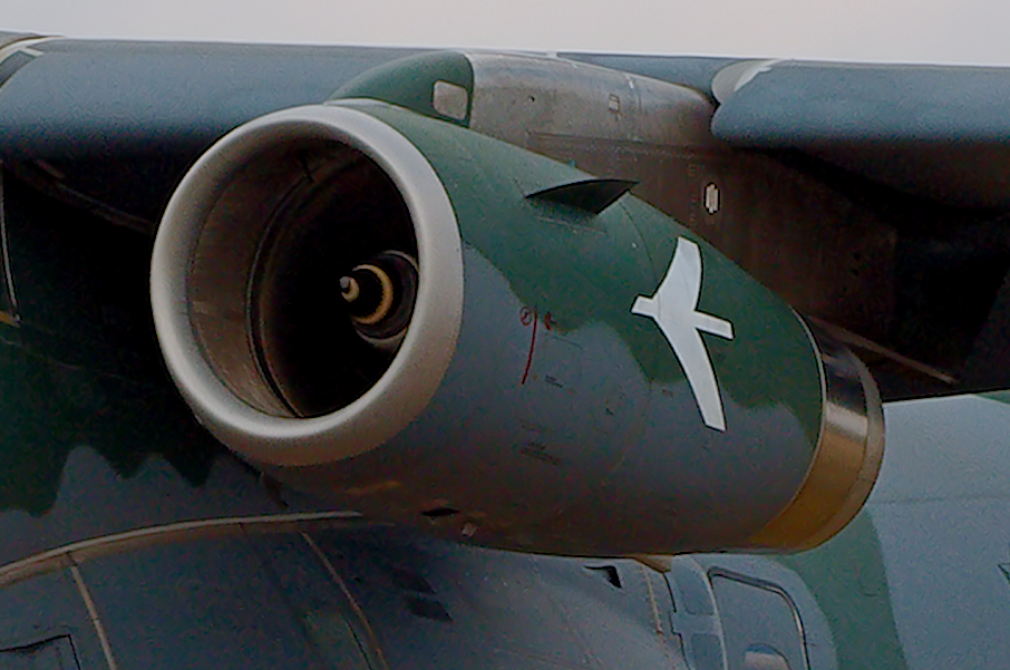 KC390 - RIAT 2018